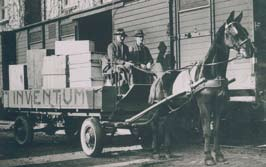 Bij gebrek aan brandstof werden paard en wagen weer gebruikt tijdens de oorlog